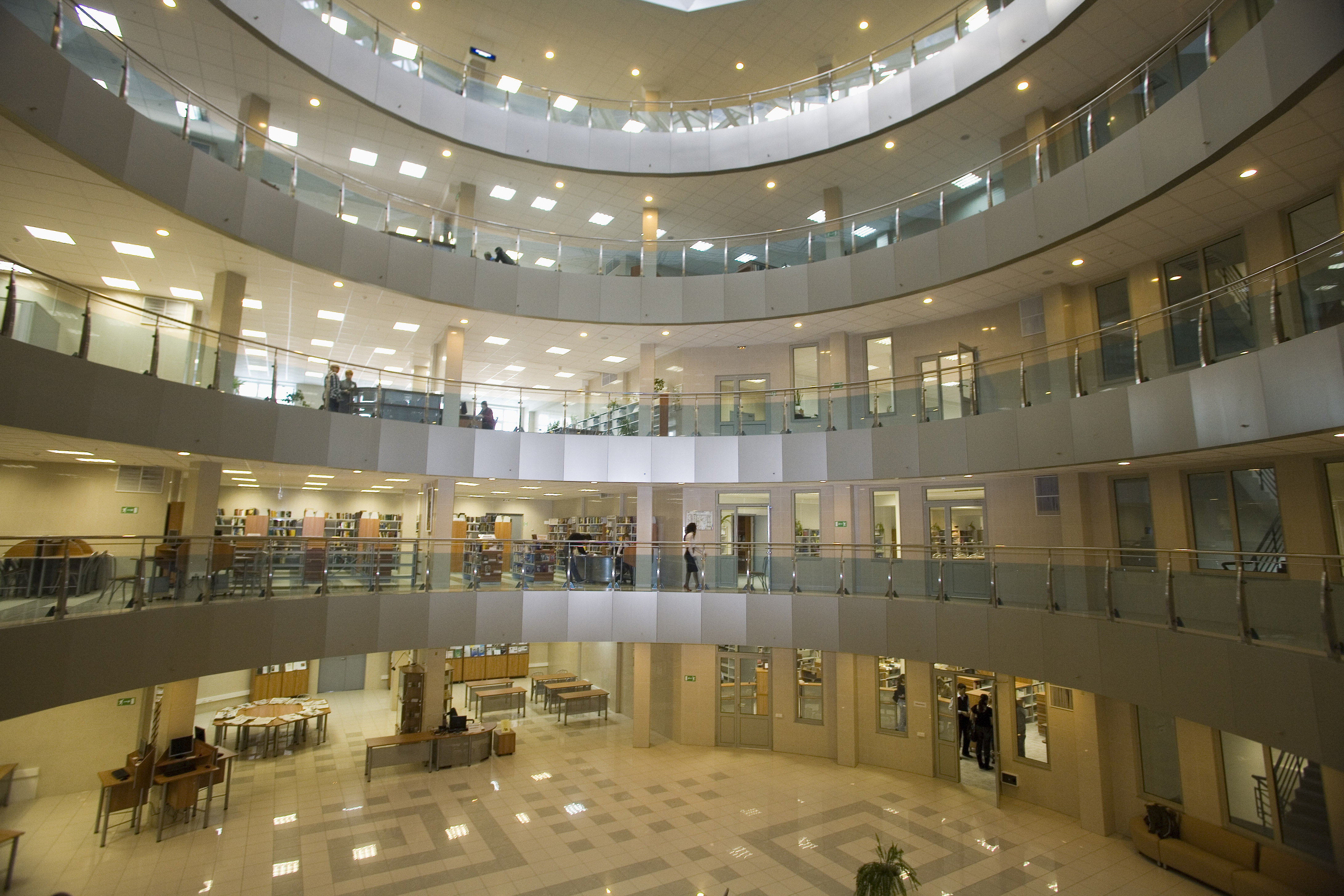 холл научной библиотеки изнутри